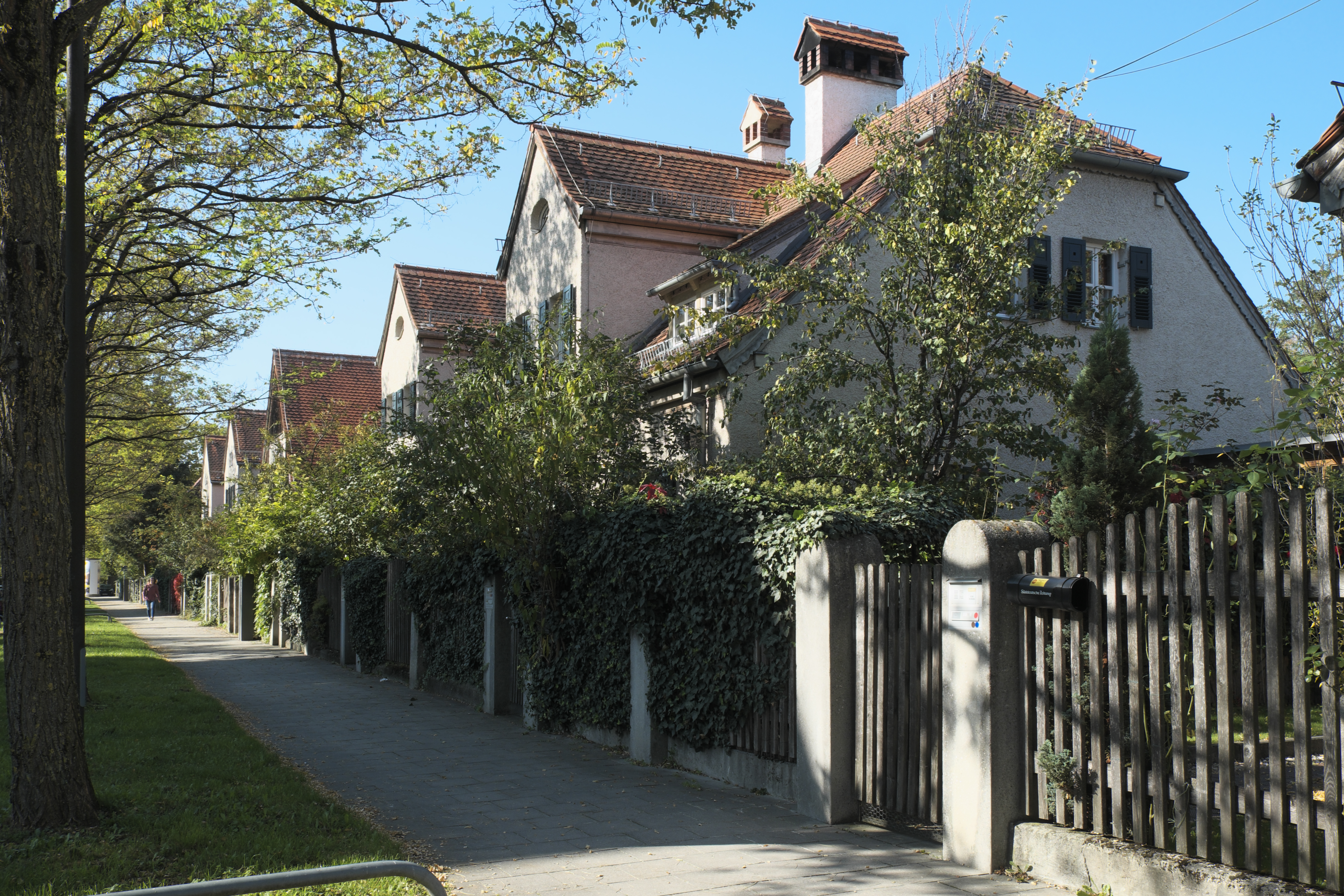 Barbarasiedlung im Stadtbezirk Schwabing-West in München (Bayern/Deutschland)